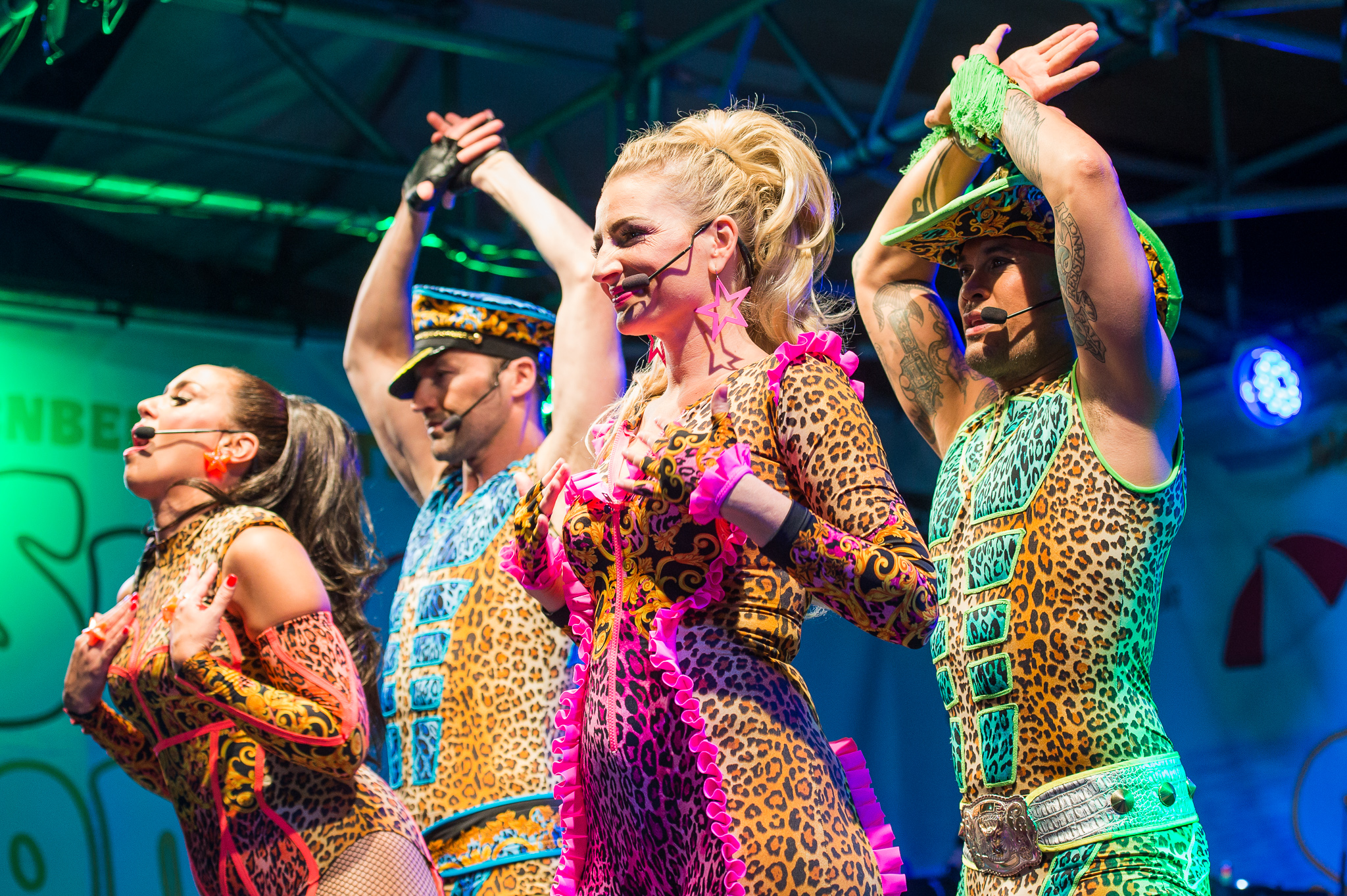 Denise Post-Van Rijswijk,Donny Latupeirissa,Kim Sasabone,Konzert,Livekonzert,Livemusik,Musik,Radio N1,Robin Pors,Super Sommer Sause 2016,Vengaboys,Werk B Events